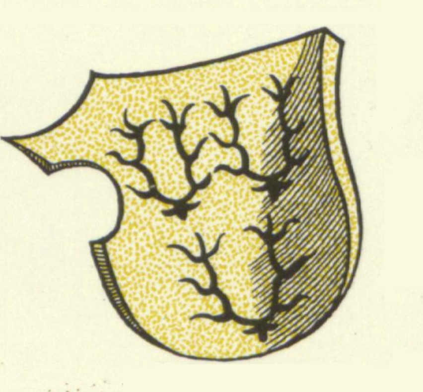 Erb pánů z Gutštejna (Klaudyánova mapa)